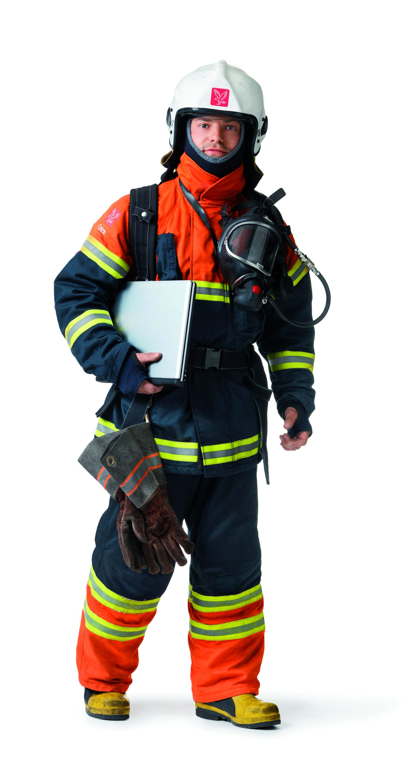 Brandmand fra Falck.